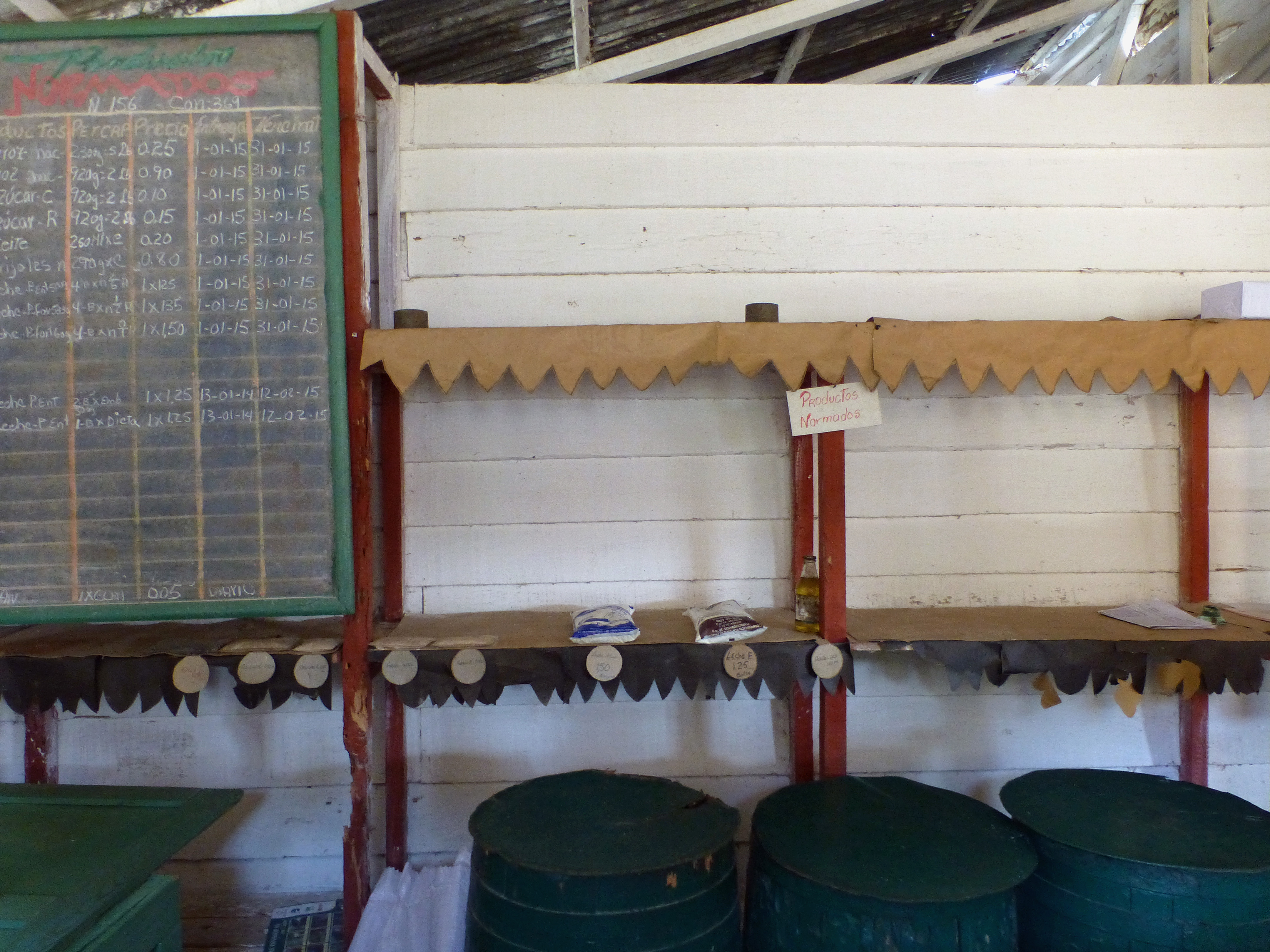 Cuba : petit magasin dans un village de la vallée de Viñales. Il s'agit d'une Unidad mixta, c'est-à-dire que les articles (rares) proposés à gauche)peuvent être acquis avec des pesos cubains. Pour se procurer ceux qui se trouvent à droite du magasin (à peine plus nombreux), il faut payer en pesos convertibles.